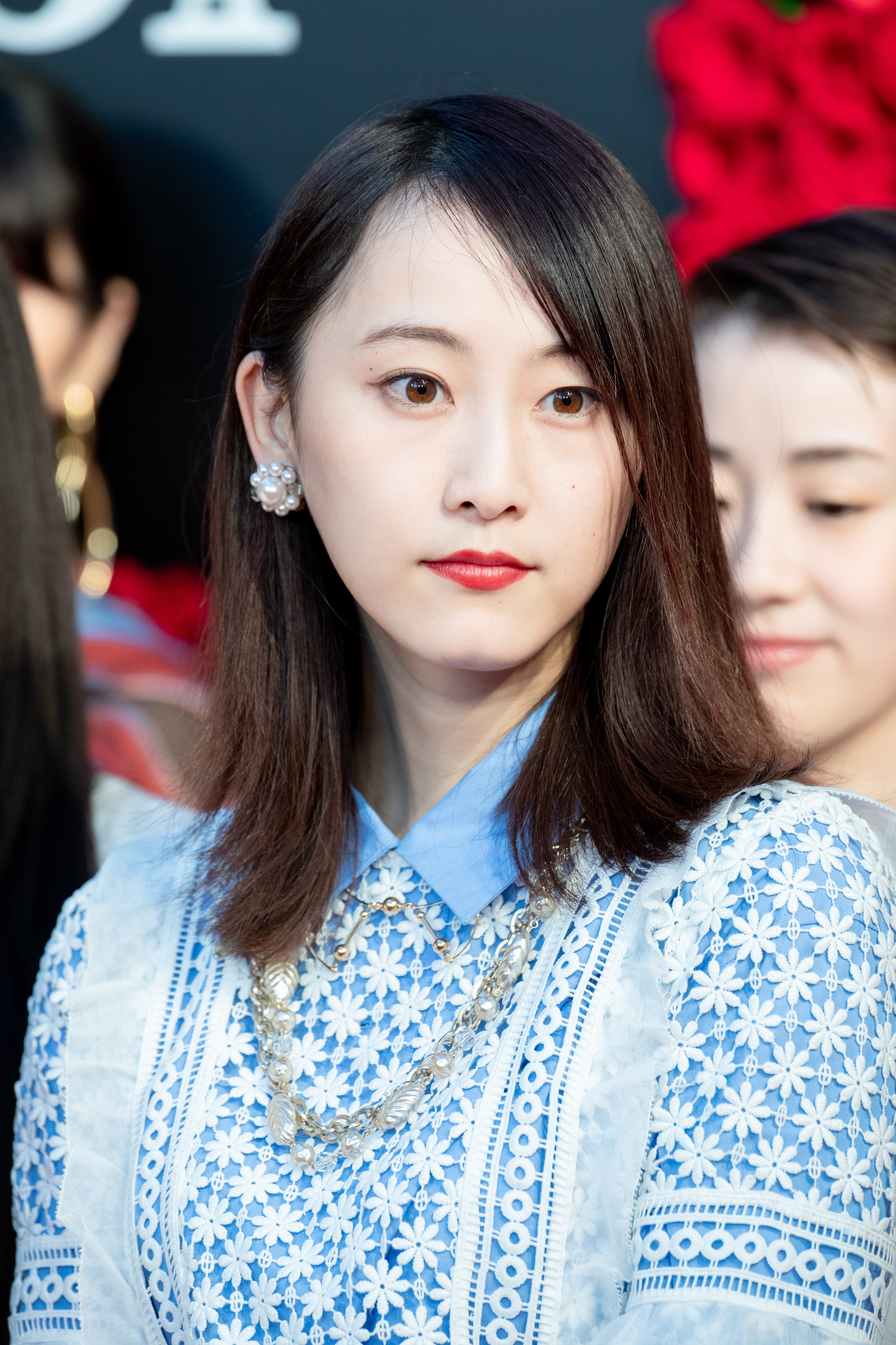 第30回 東京国際映画祭 オープニングセレモニー 松井玲奈 (21世紀の女の子)